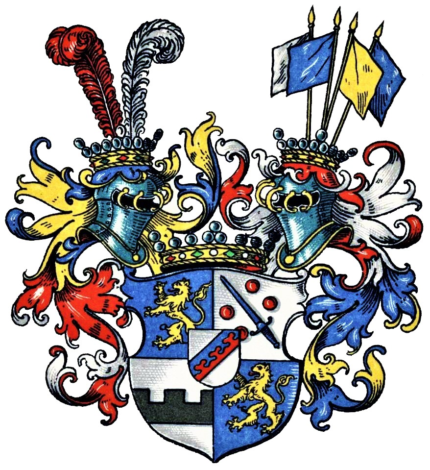 Wappen der Familie Freiherren (Barone) von Delwig von 1720.